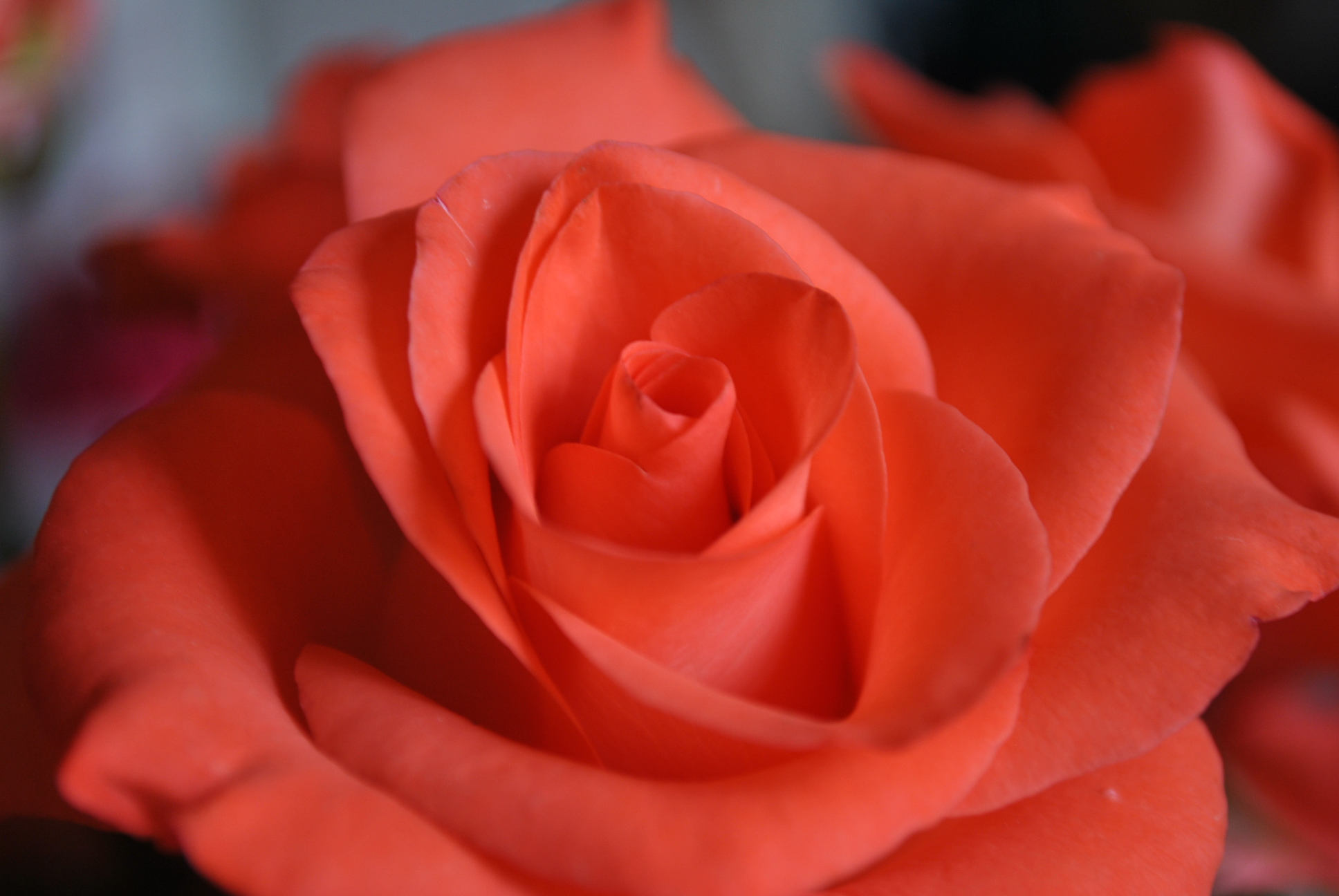 Rosa roja